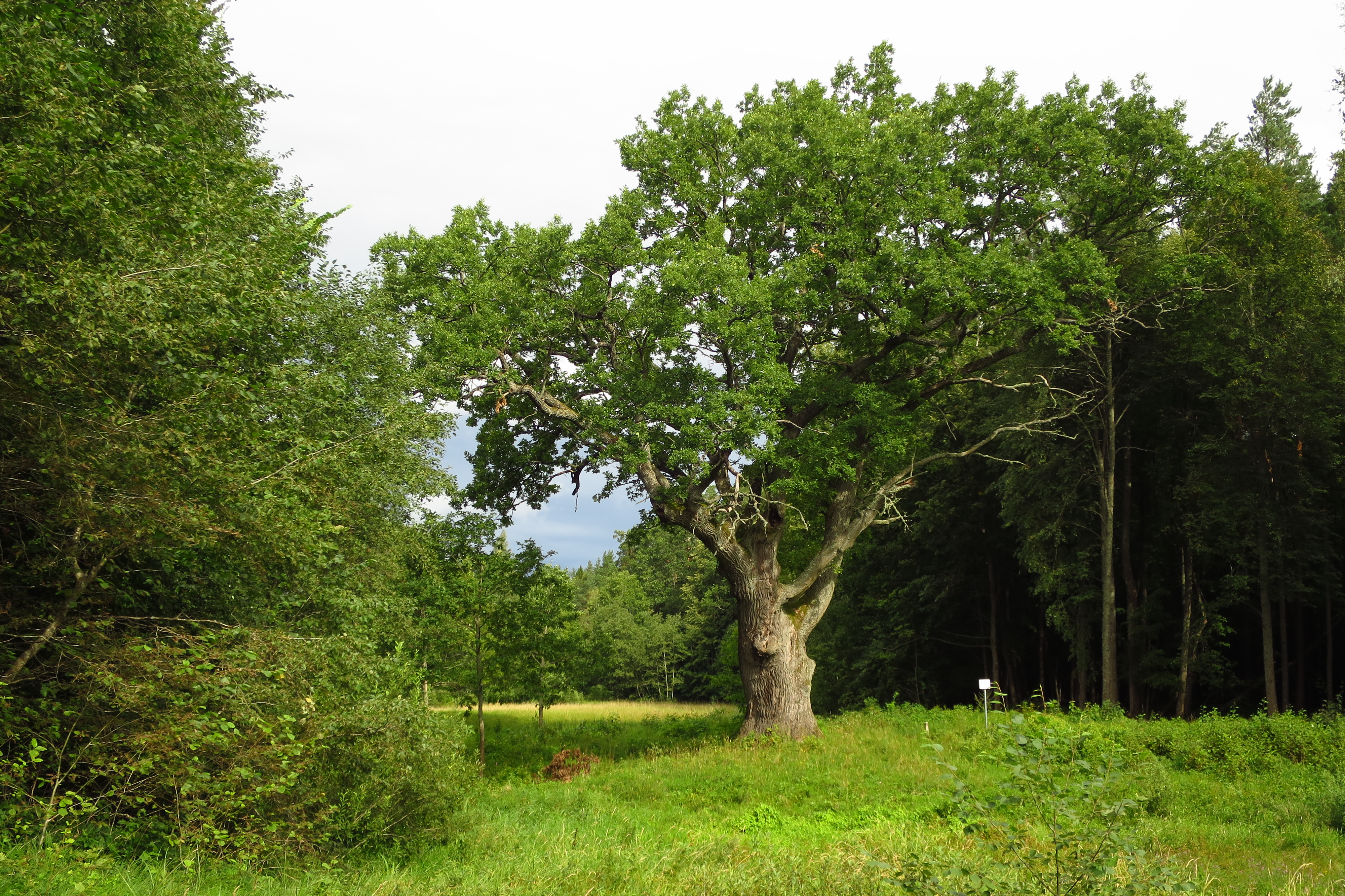 Koiva tamm Koiva-Mustjõe MKA-l